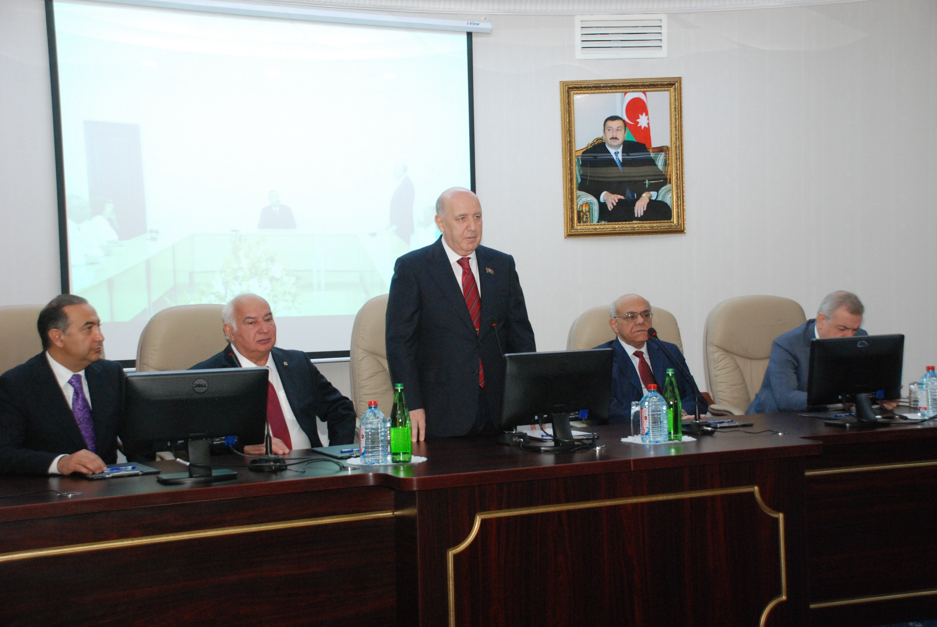 Akademik Əhliman Əmiraslanov ATU-da konfrans zamanı. 2014-cü il.